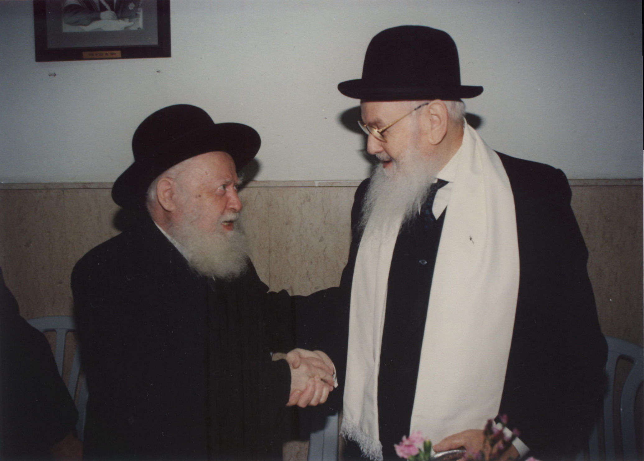 הרב משאש יחד עם הרב שפירא